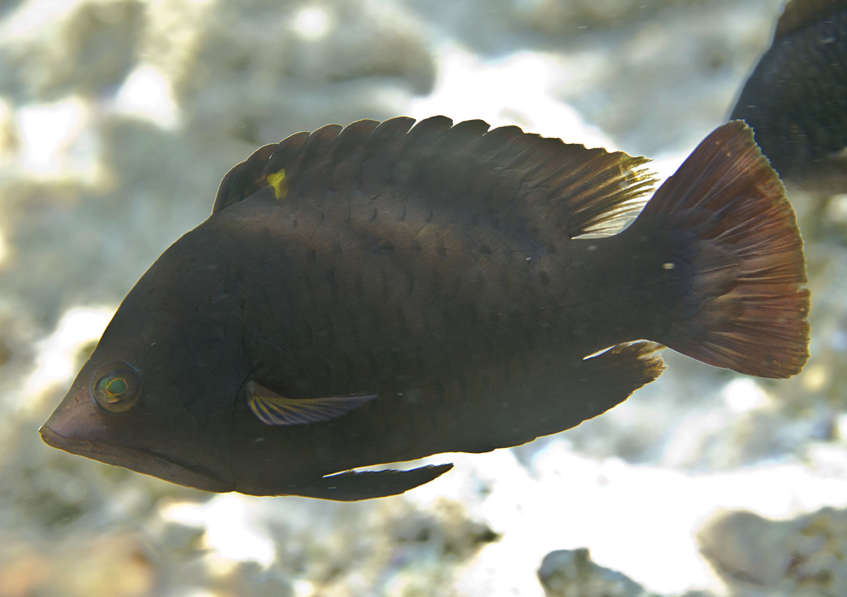 Un labre à long museau (Epibulus insidiator) à la Réunion.